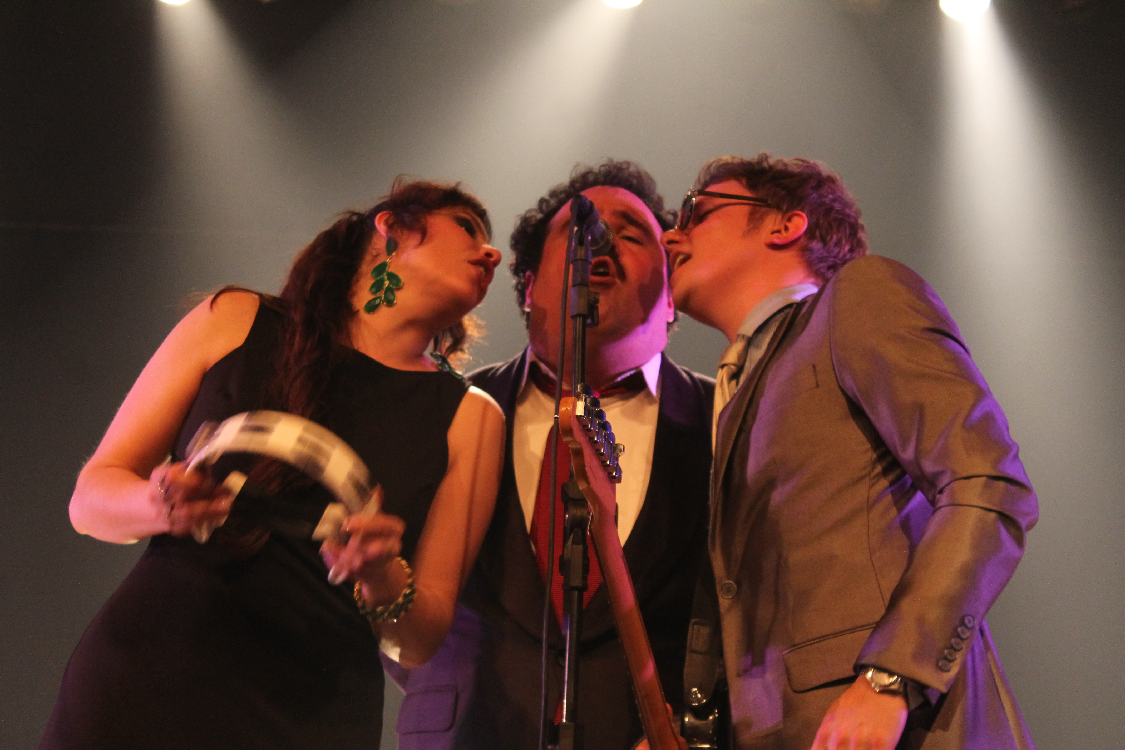 Vivi Peçaibes, Carlinhos Carneiro e Rodrigo Pilla se apresentam em show da Bidê ou Balde no Teatro Renascença